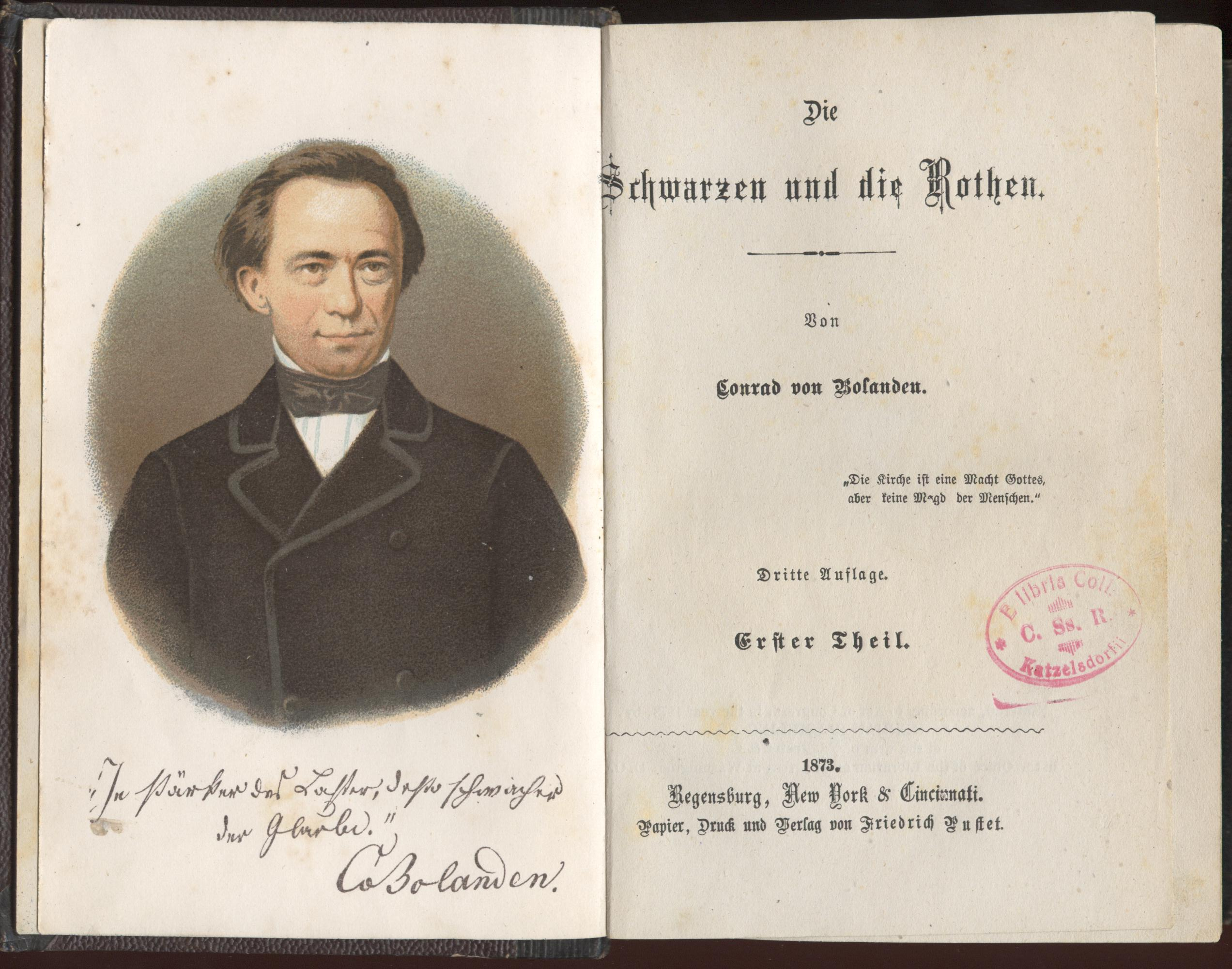 Conrad von Bolanden, Titelblatt zum Roman "Die Schwarzen und die Roten"